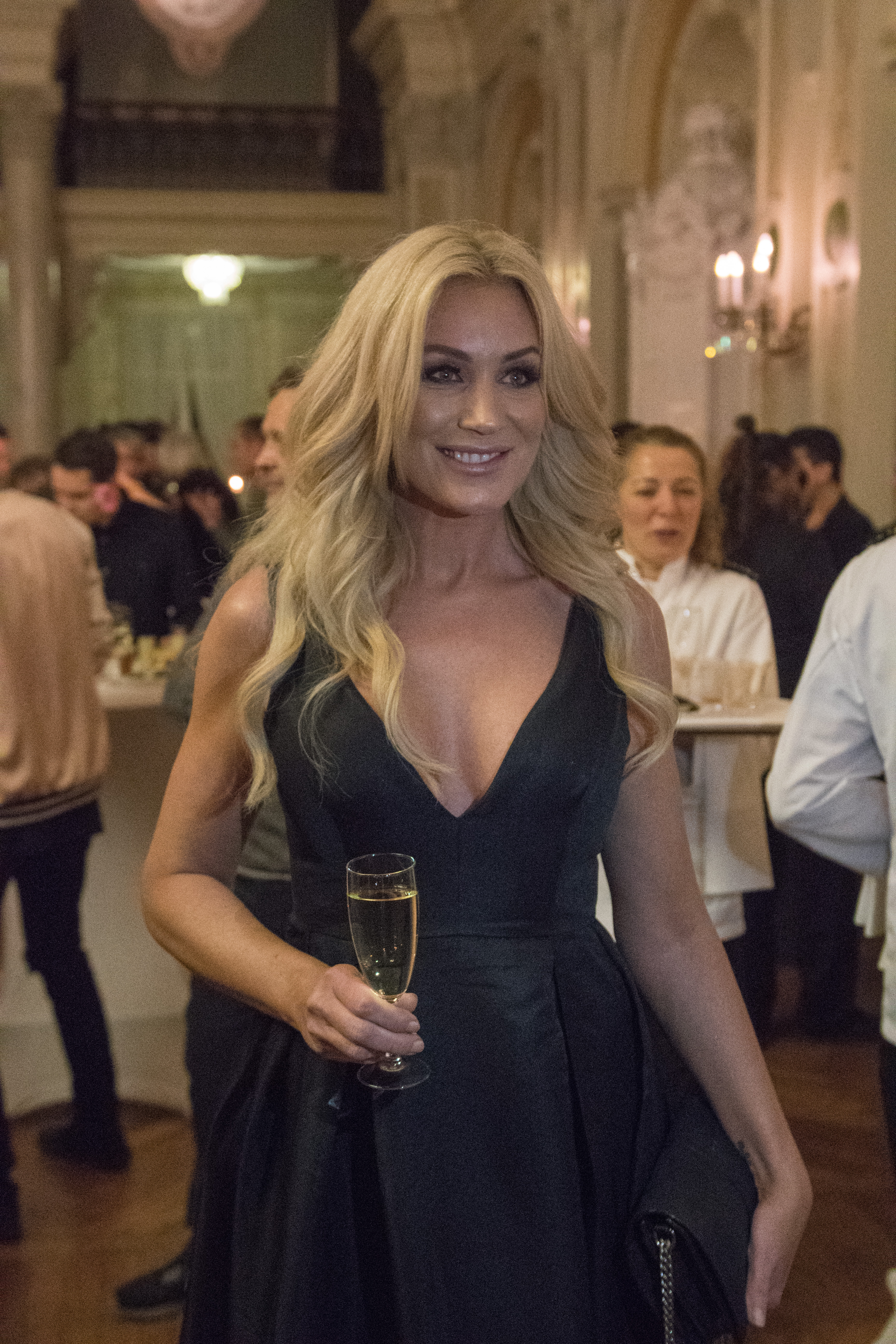 Jessica Andersson på förfesten torsdagen innan Melodifestivalen 2018.